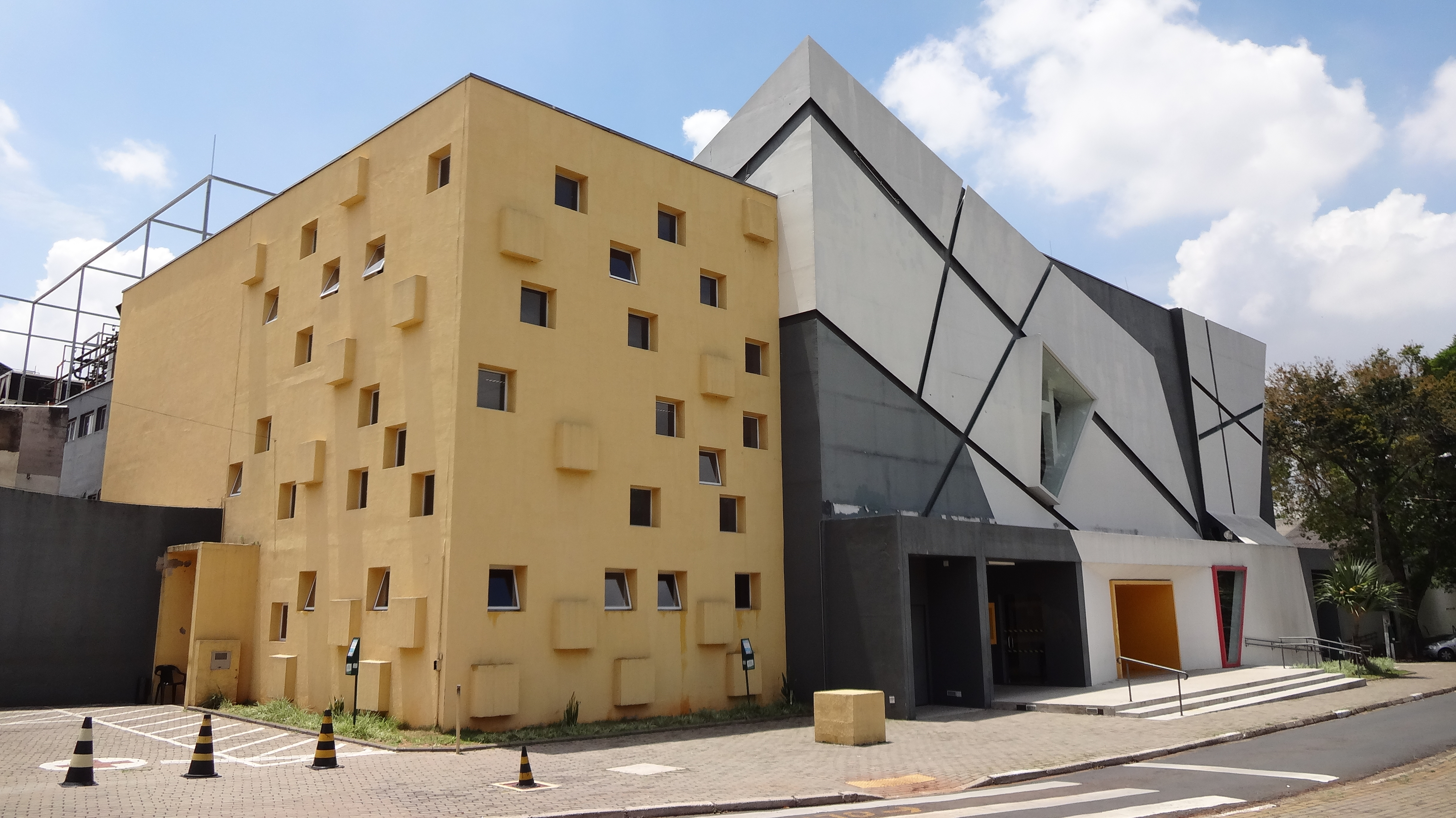 Fachada do Teatro Municipal Castro Mendes